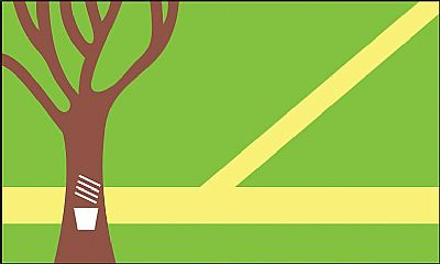 bandeira do Assis Brasil